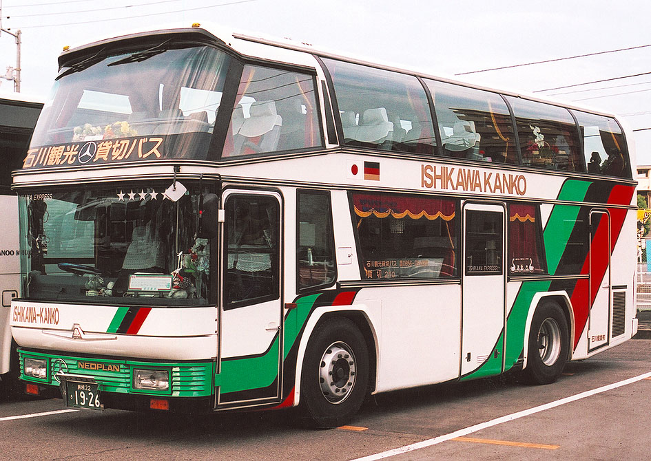 石川産業 ネオプランスカイライナーN122/2